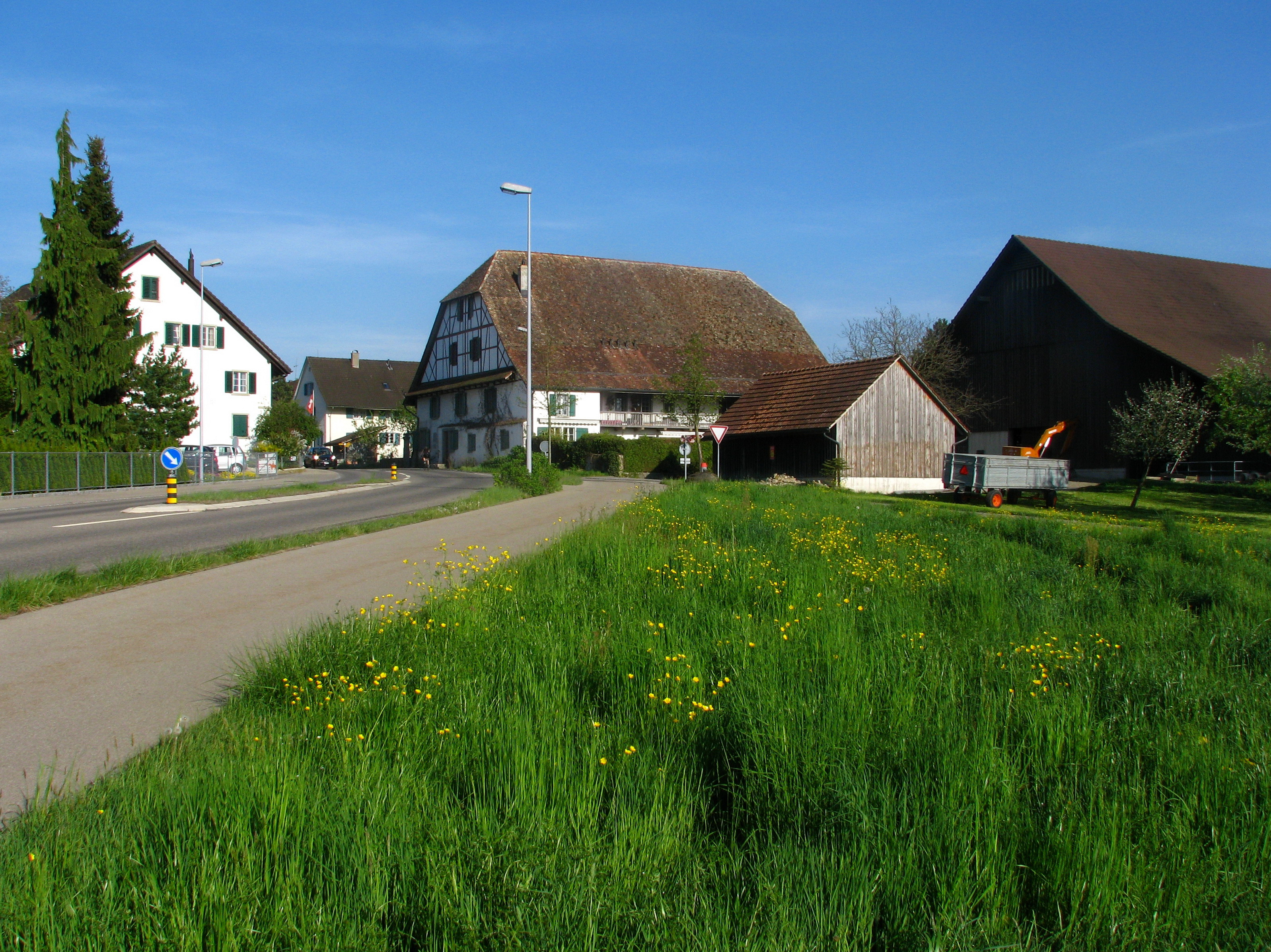 Chatzenrüti in Rümlang (Switzerland)